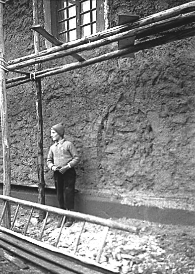 Dorfkirche Bernbach bei Bad Herrenalb: Zugemauerter Spitzbogeneingang der Betkapelle von vor 1585